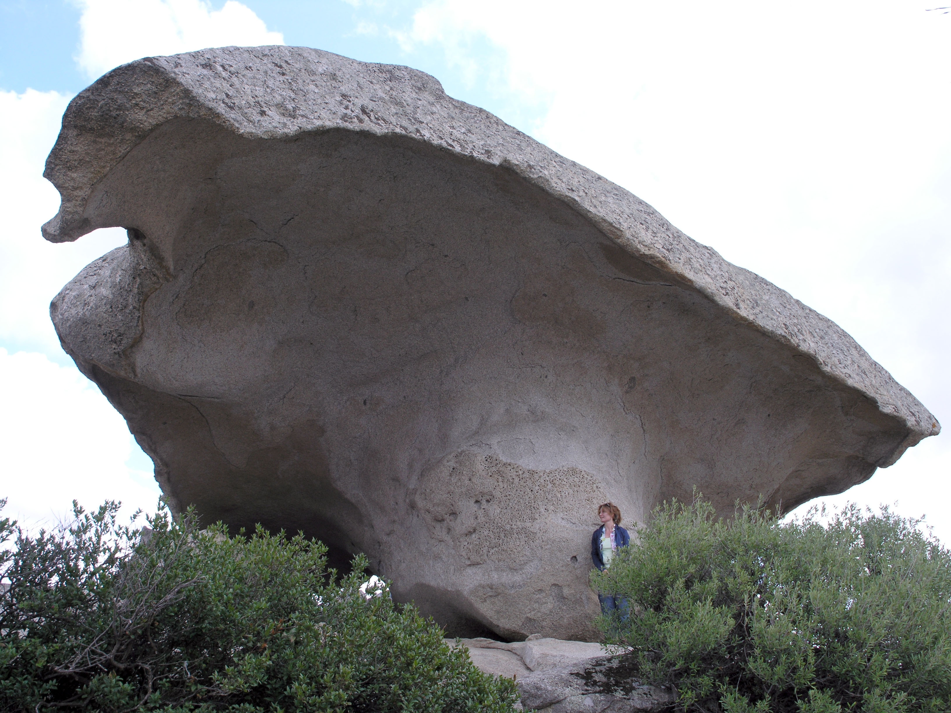 Sardiniens bekannteste Granitform „Il Fungo“ (der Pilz)